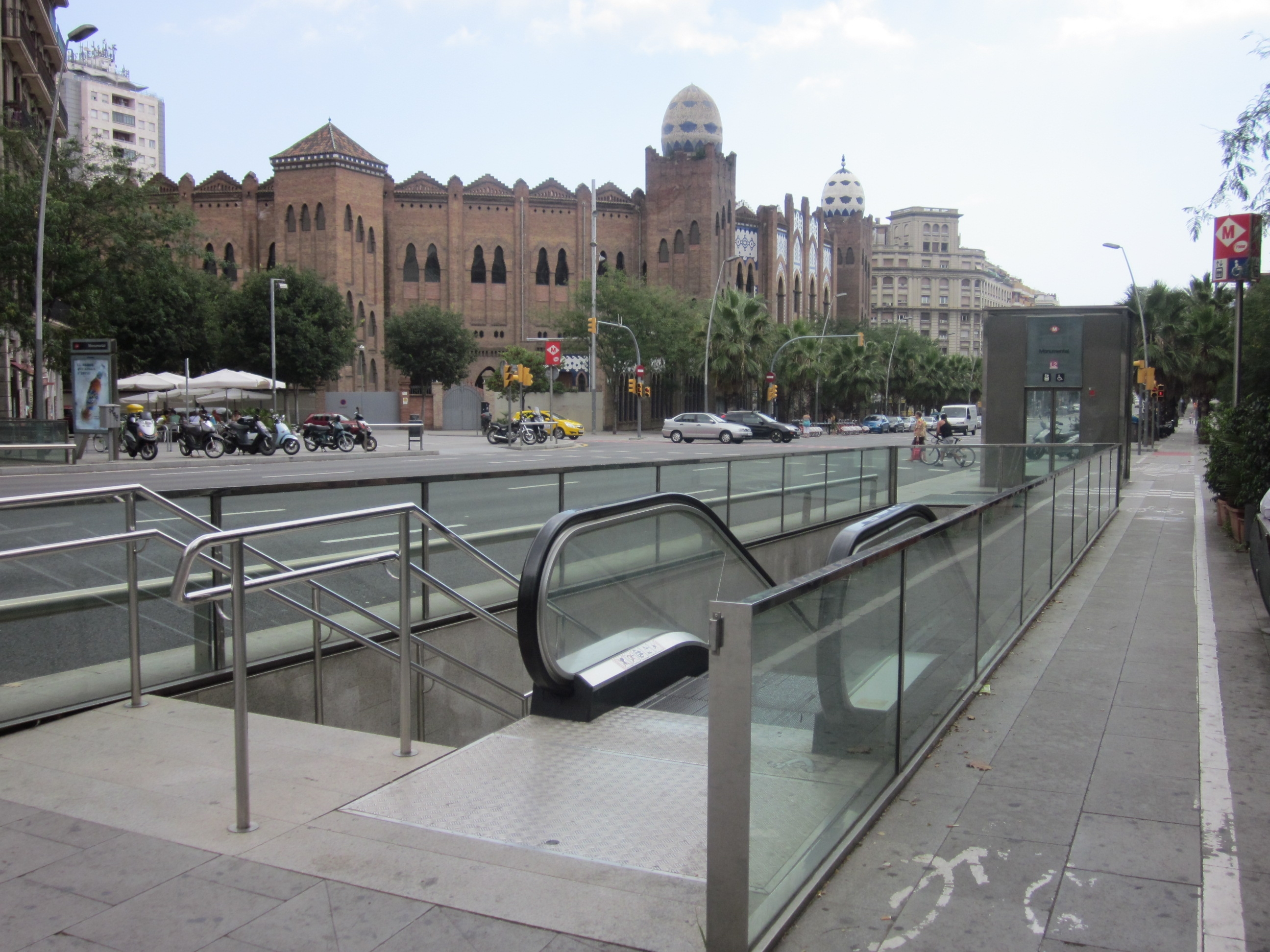 Accesos a la estación de Metro Monumental, en la calle Marina de Barcelona. Al fondo, la plaza de toros.